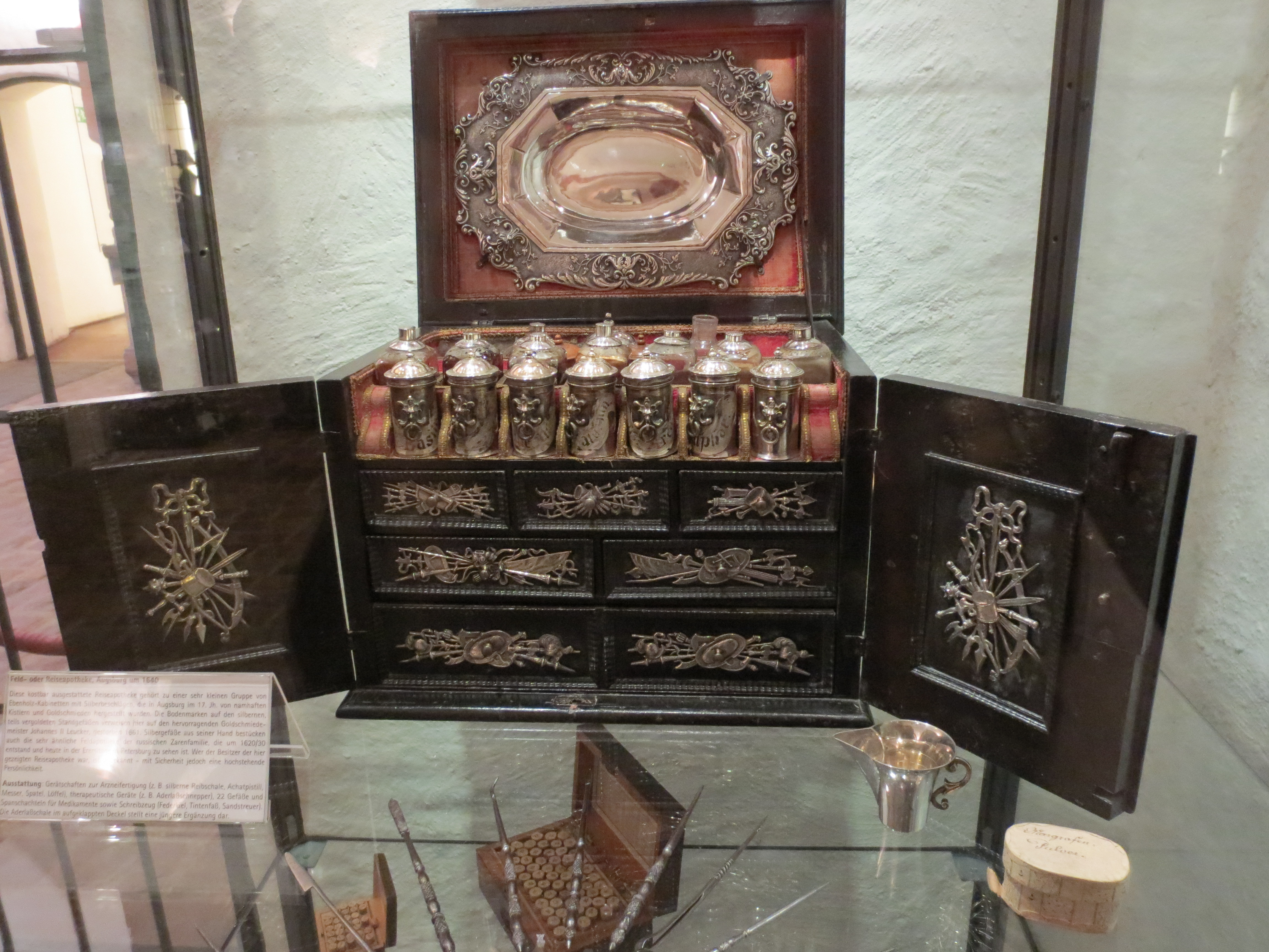 Feld- und Reiseapotheke aus dem Bestand des Deutschen Apothekenmuseums Augsburg 1640